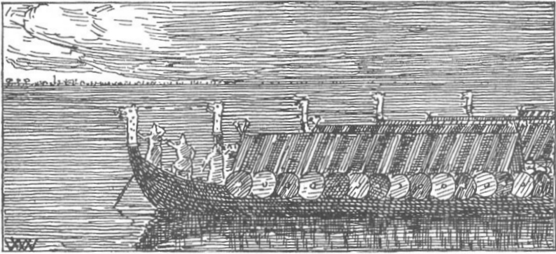 Wilhelm Wetlesen: Illustration for Harald Hardrådes saga, Heimskringla 1899-edition. nn: «Om morgonene då sola rann, såg dei daneskipa.»